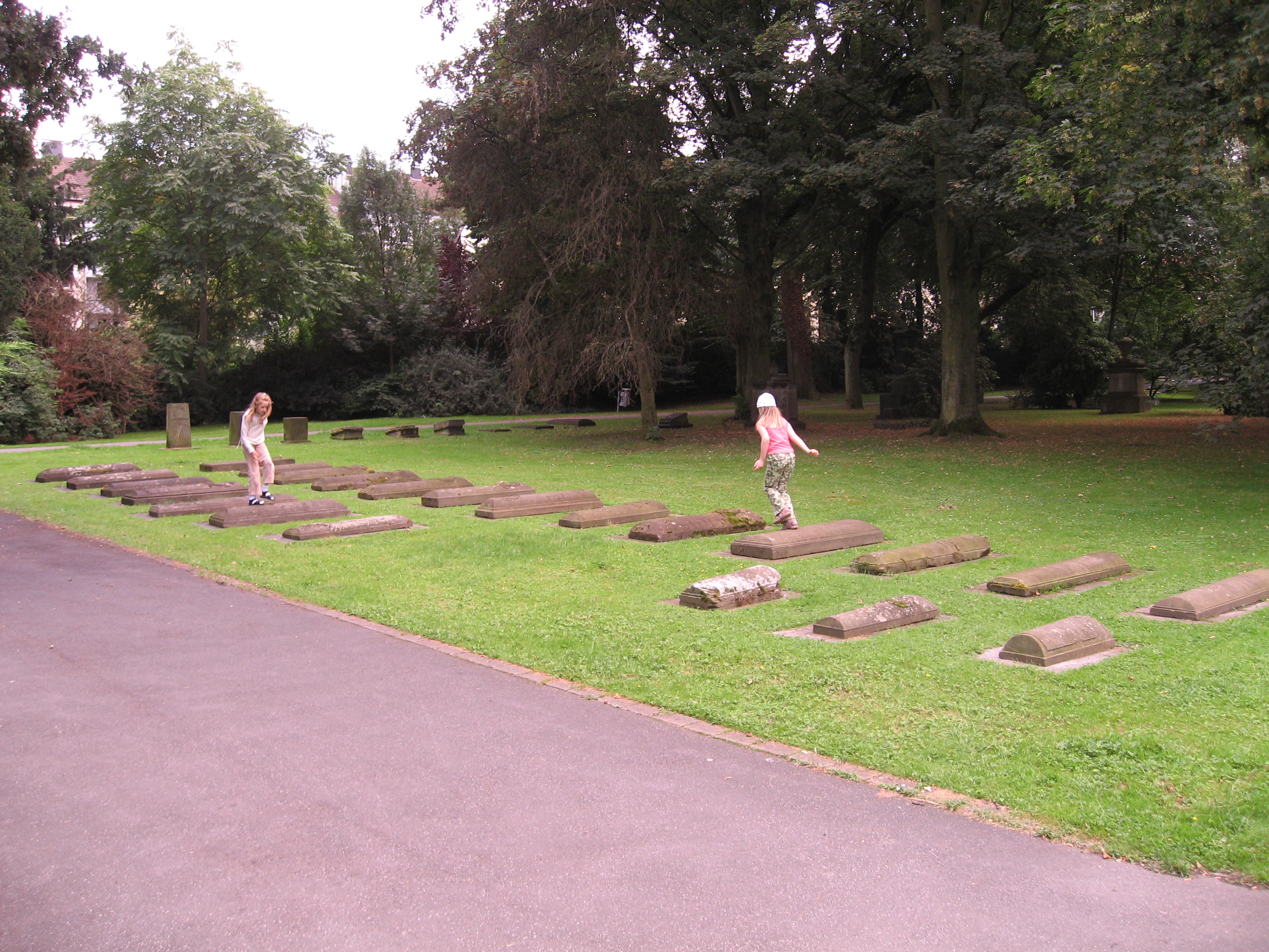 Dortmund, westliche Innenstadt, Westpark, Nordbebauung, Friedhof, Grabplatten, Kinder